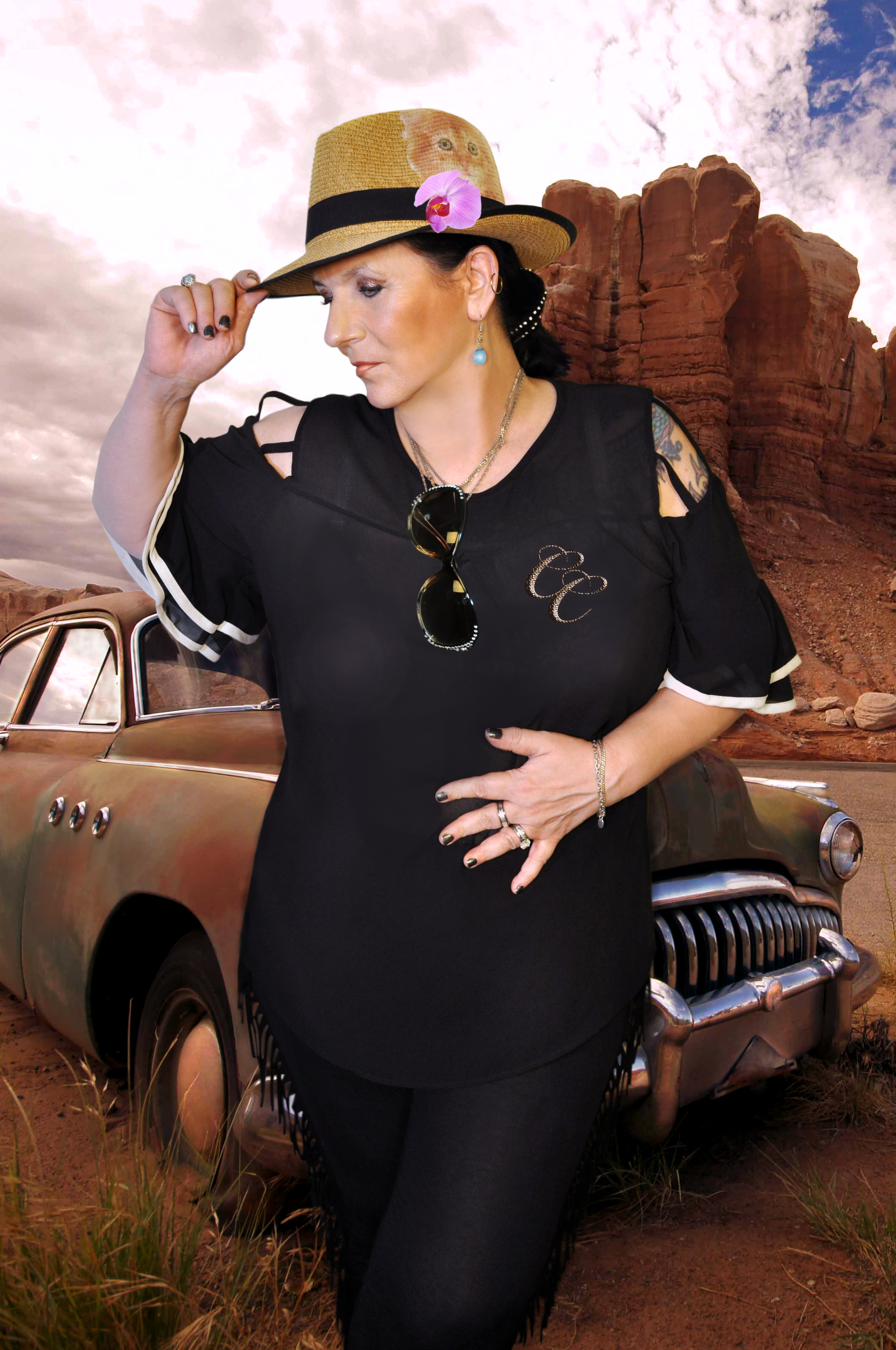 C.C.Tennissen